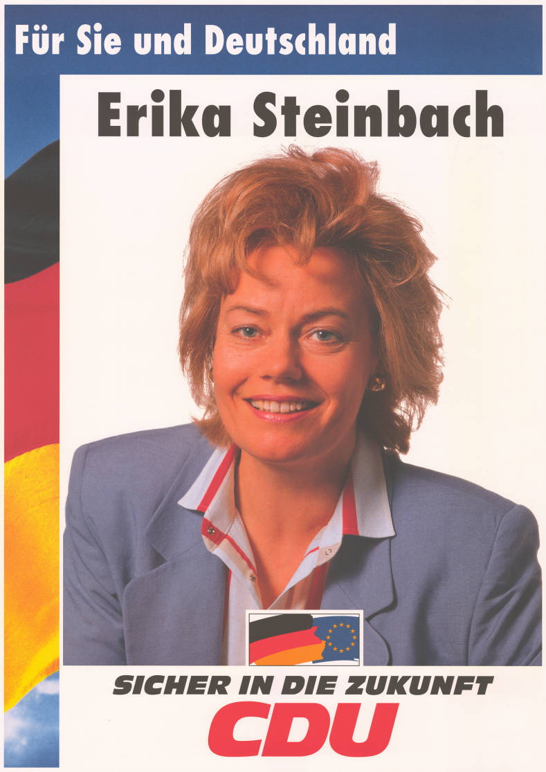 Für Sie und Deutschland Erika Steinbach Sicher in die Zukunft CDU Abbildung: Porträtfoto - Nationalfarben Plakatart: Kandidaten-/Personenplakat mit Porträt Objekt-Signatur: 10-030 : 507 Bestand: Europawahlplakate (10-030) GliederungBestand10-18: Europawahlplakate (10-030) » CDU Lizenz: KAS/ACDP 10-030 : 507 CC-BY-SA 3.0 DE